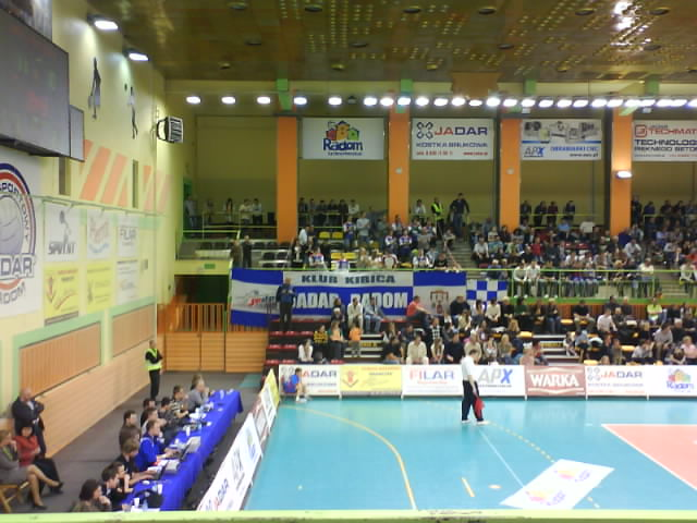 Jadar Radom "fans"